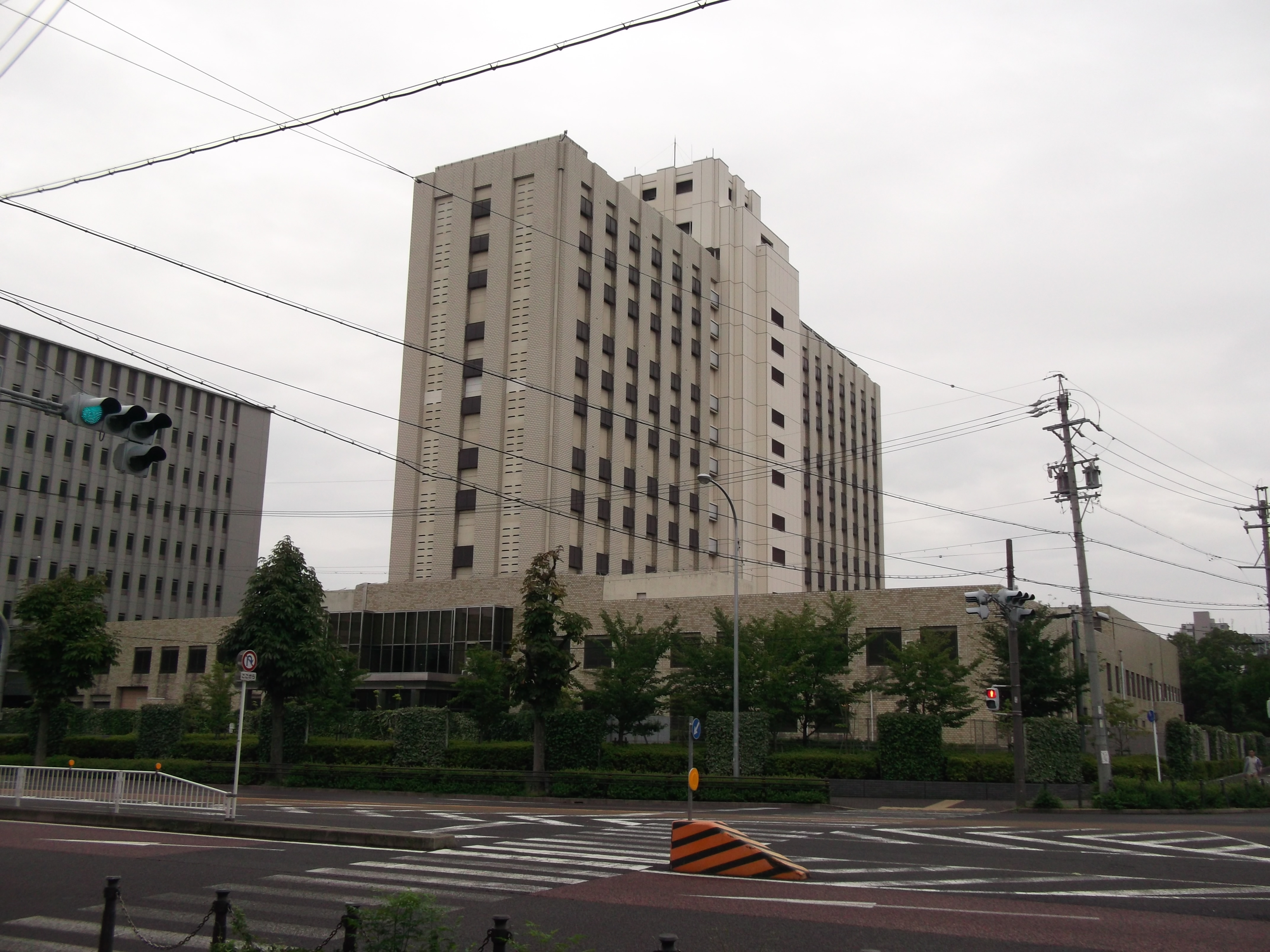 名古屋市東区白壁の名古屋拘置所を北側公道から撮影